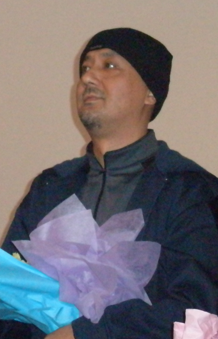 中国演员姚橹，摄于电影孔子南京观众见面会